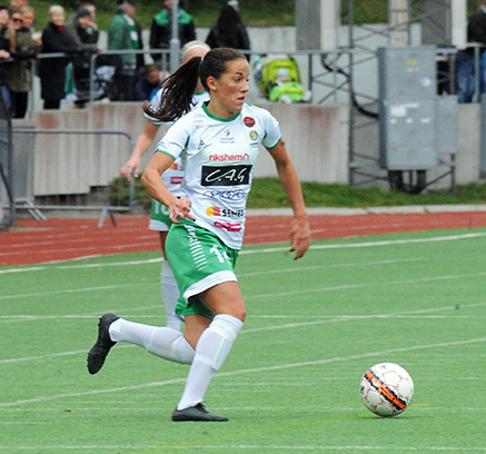 Anna Oskarsson playing for Hammarby